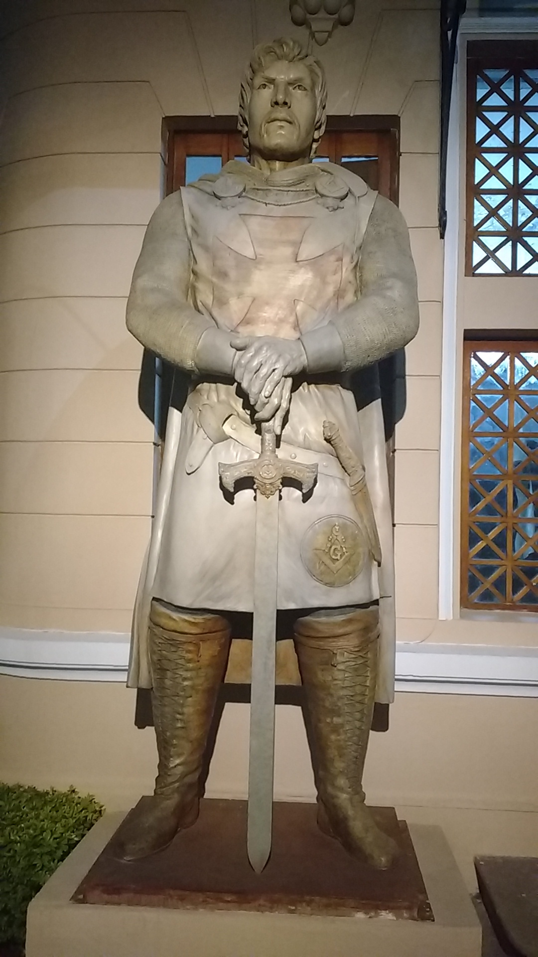 Una de las esculturas de un par de caballeros templarios que adornan la entrada de la Gran Logia de Colombia con sede en Bogotá.